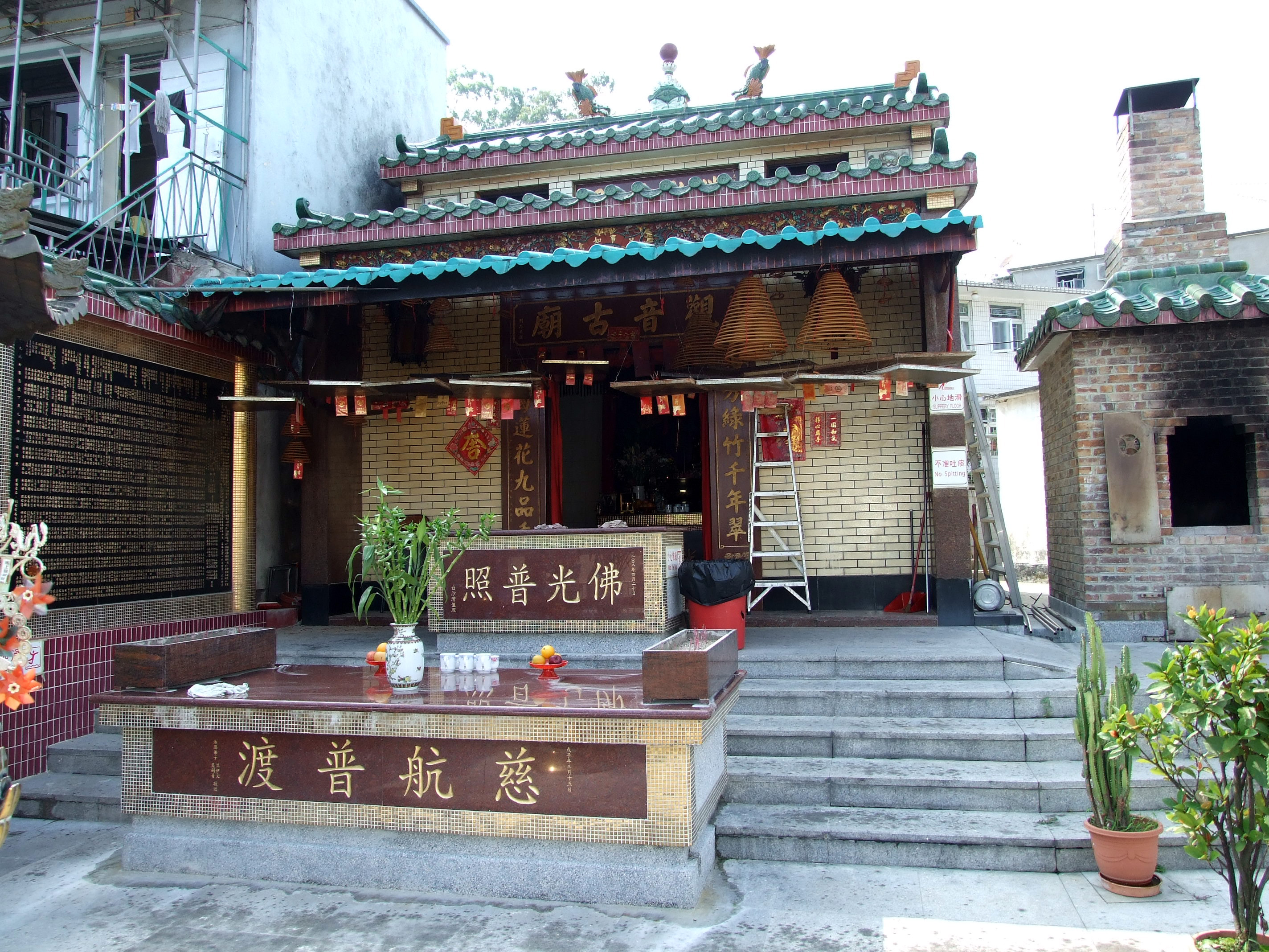 中文（香港）: 白沙灣觀音廟